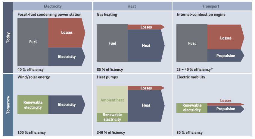 Vergleich des primärenergetischen Wirkungsgrades verschiedener fossiler und regenerativer Energietechnologien